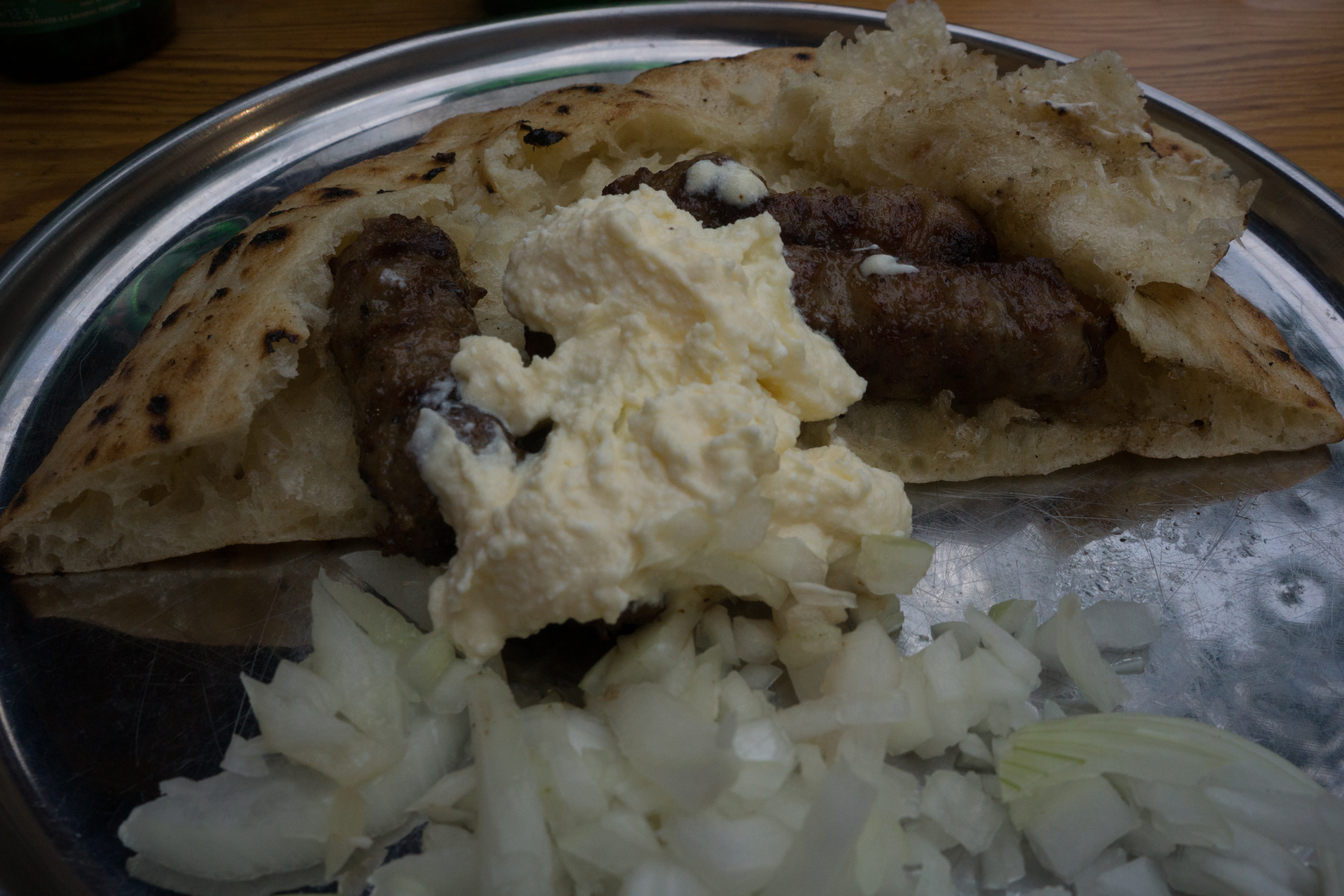 Des cevapi accompagnés de kajmak.